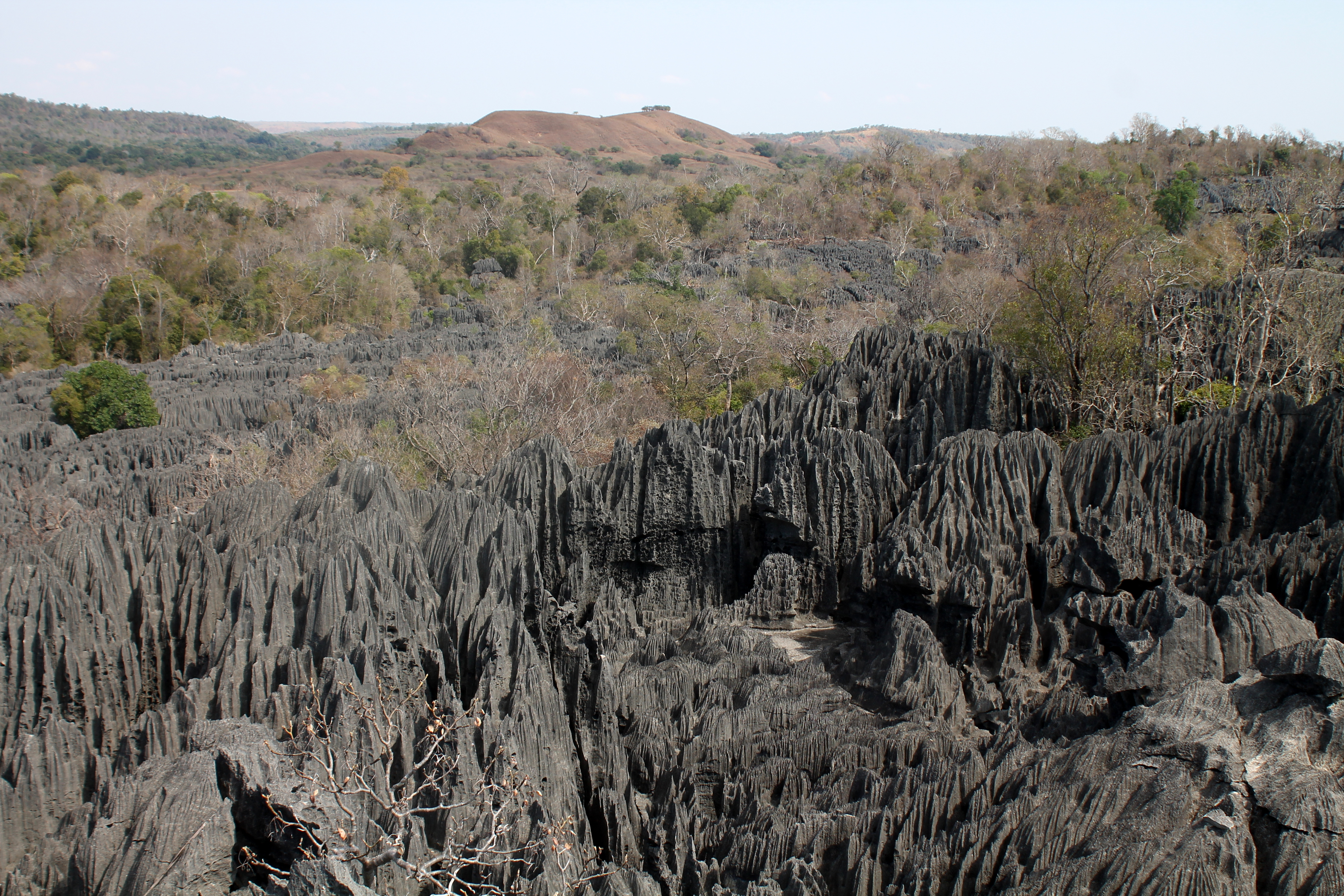 Grand Tsingy